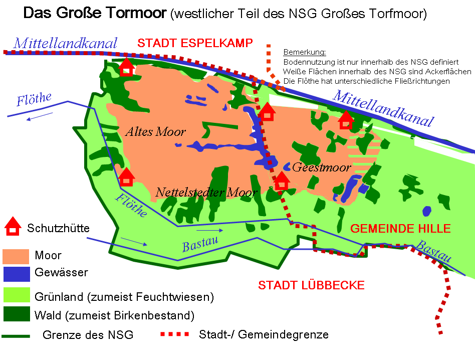 Karte Großes Torfmoor